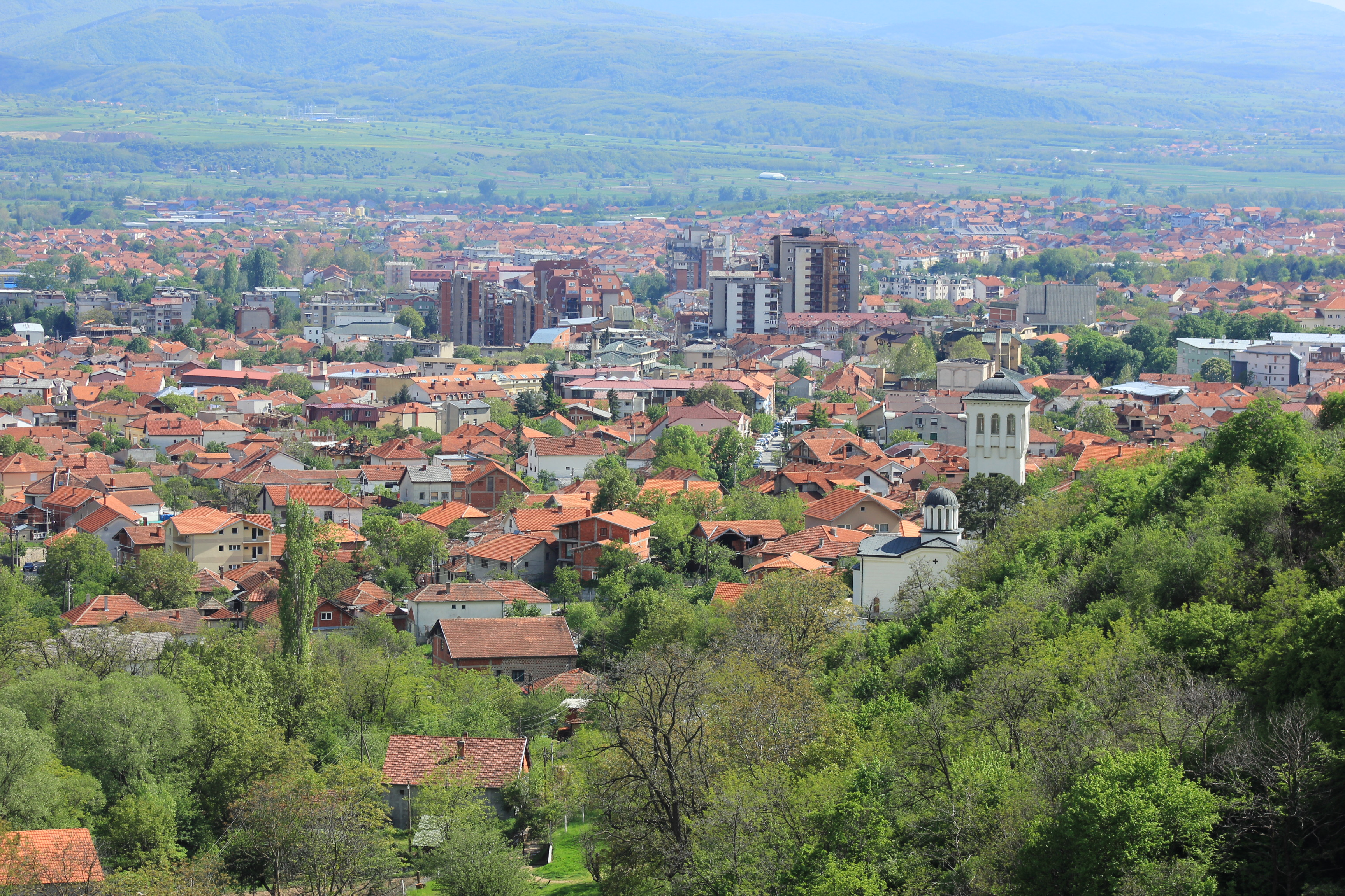 Панорамен поглед към град Враня, Сърбия.